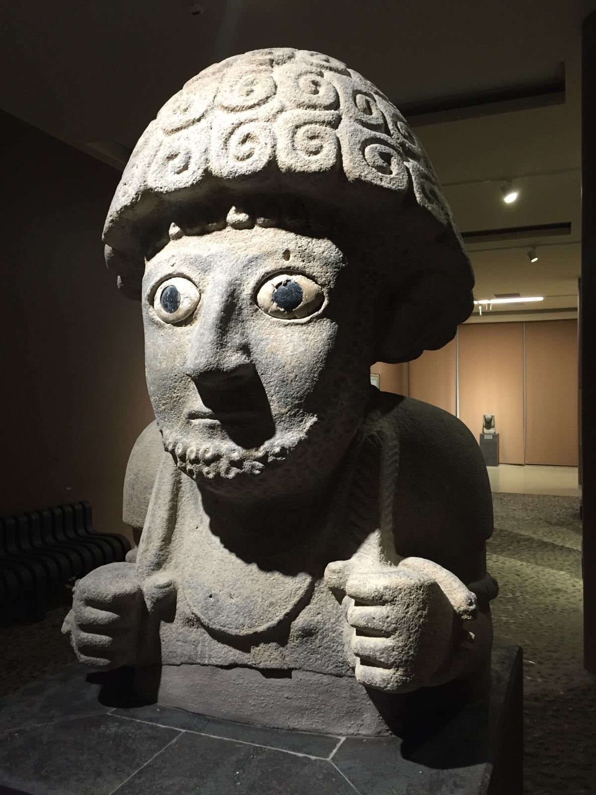 Statue de Suppiluliuma, roi de Patina (Unqi), v. 9e s. av. J.-C. Provenance : Tell Tayinat. Musée archéologique d'Antakya